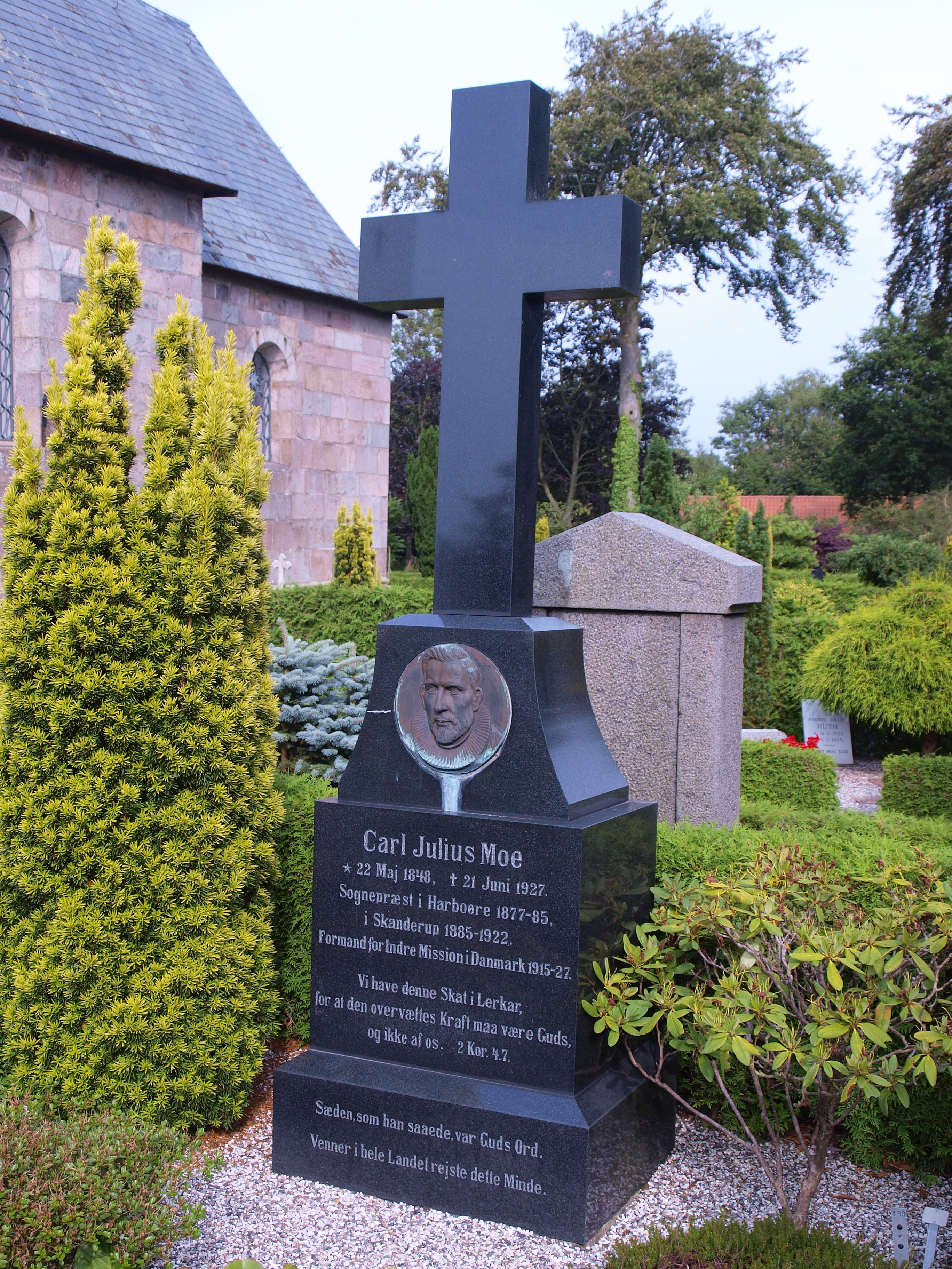 Carl Moe, gravsted Skanderup Kirke (Kolding Kommune)